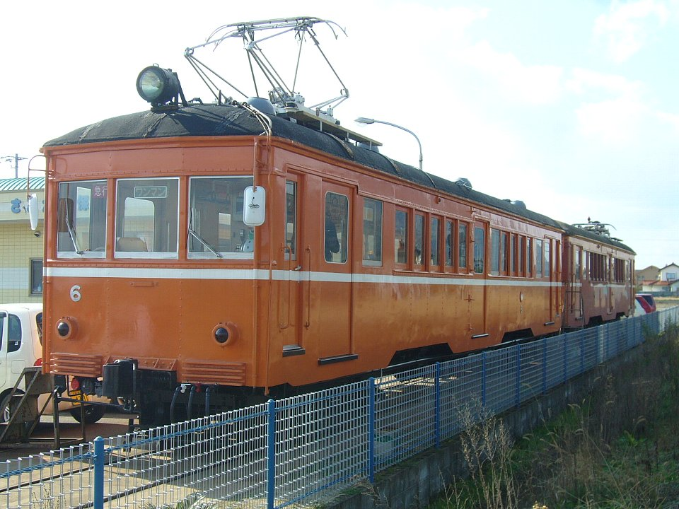 一畑電気鉄道 デハ6（手前）・デハ3（奥） さとがた保育園に保存